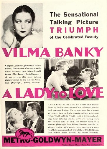 Pubblicità del film "A Lady to Love"